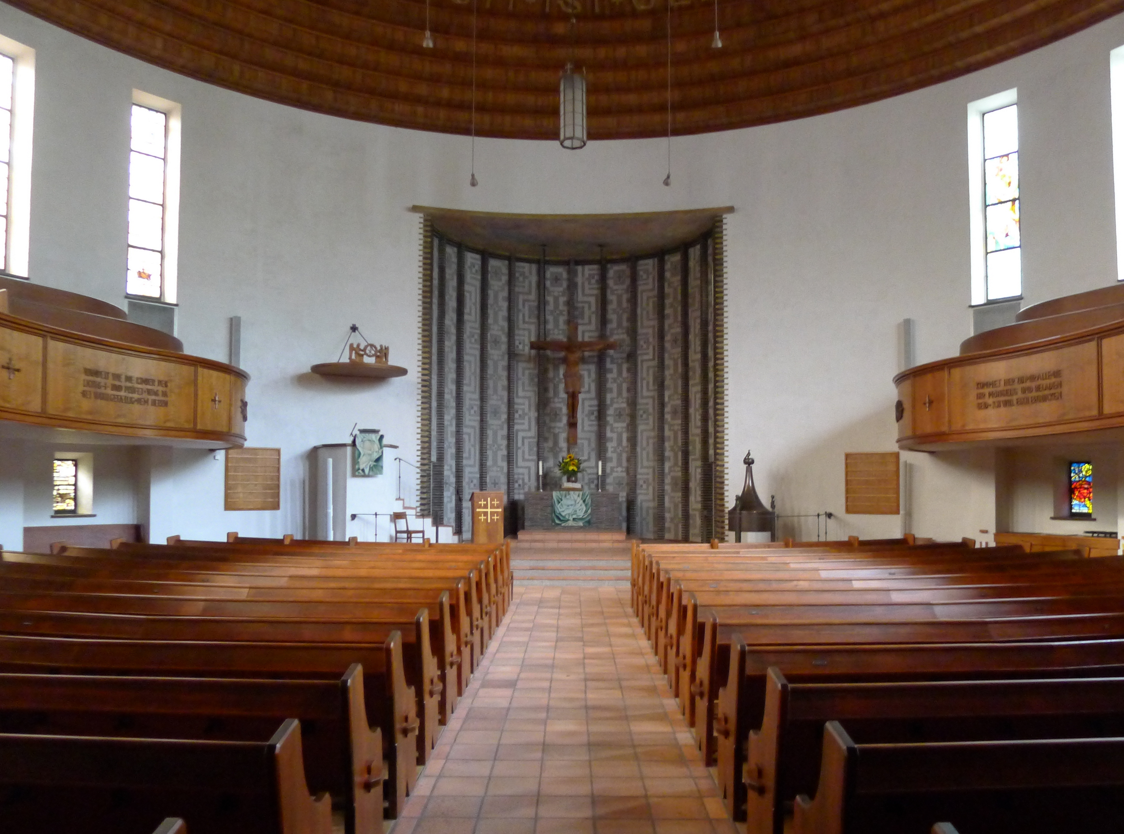 Blick in die Apsis mit Altar und Kruzifix